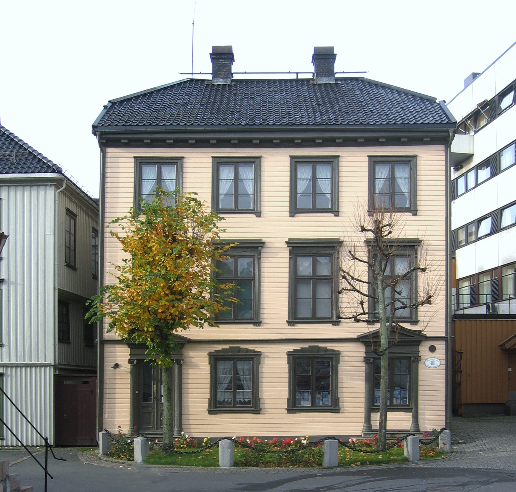 Kløckers hus, Arendal Bymuseum på Tyholmen i Arendal.